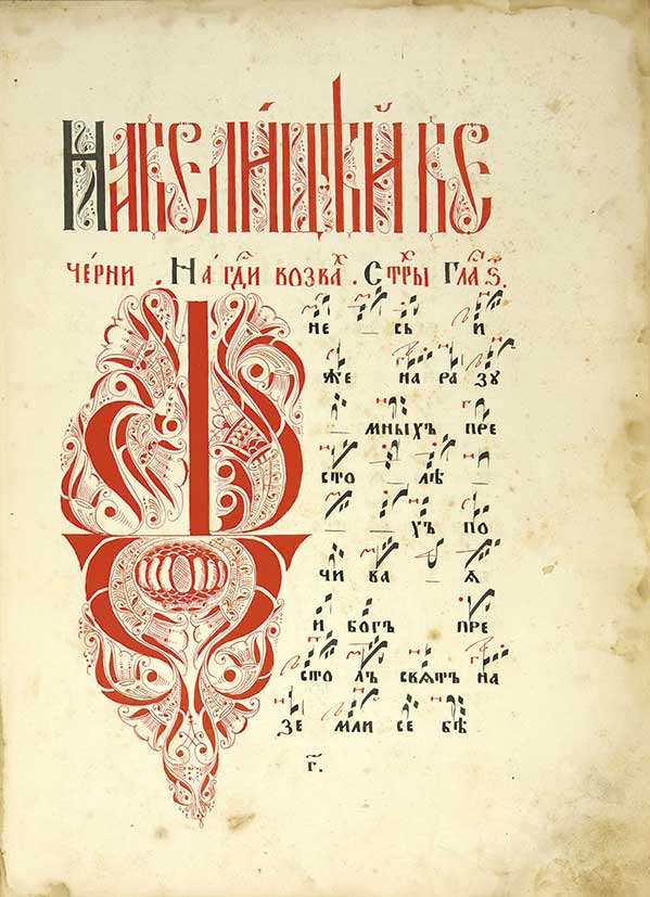 Октоих: крюковый. 2-я половина XIX в.Рукопись. 2° (34,5 х 25 см). [158] л. Полуустав XIX в. Киноварь. Нотация знаменная с киноварными пометами.Нумерация листов внизу, по центру, кириллическими цифрами.Украшения: Инициалы поморского стиля; киноварь – л. 1 об. («В»); 3 («?»); 13 об., 28, 30, 70 об., 101 («Д»); 15 об. («К»); 43, 58 об., 109 об., 121 об., 132, 143 («П»); 72, 111 («Г»); 84 об. («Н»); 85 об. («С»); 96 об., 145 («?»); 120 об. («Оу»); 130 об. («М») (всего 22).Вязь: первая буква – черная, остальные – киноварь (л. 1, 3, 13 об., 15 об., 28, 30, 43, 58 об., 70 об., 72, 84 об., 85 об., 96 об., 101, 109 об., 111, 120 об., 121 об., 130 об., 132 об., 143, 145.Бумага: целлюлозная, без штемпелей, высокого качества.